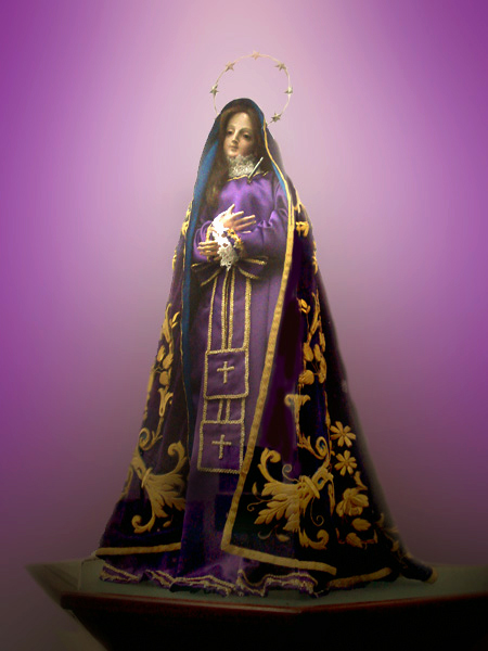 Imagem da Padroeira da Igreja das Dores, Porto Alegre, Brasil.